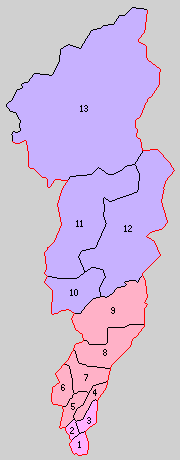 静岡県周智郡の町村。